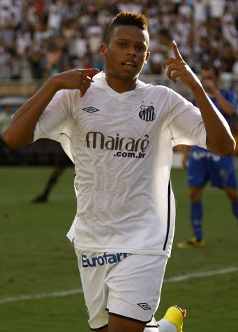 Comemoração gol André - 2010